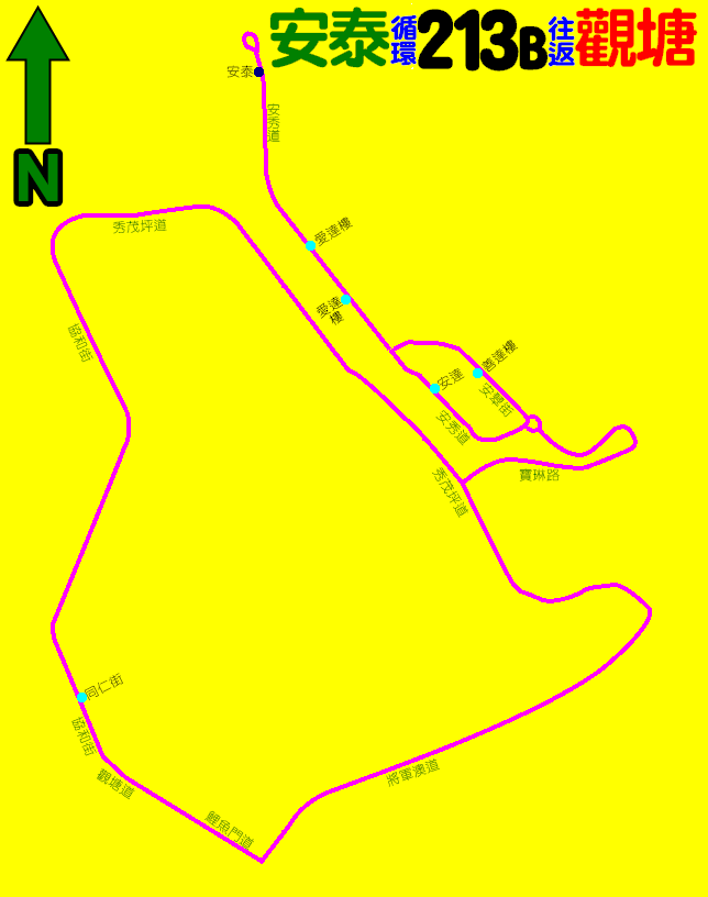 九巴213B線的走線圖